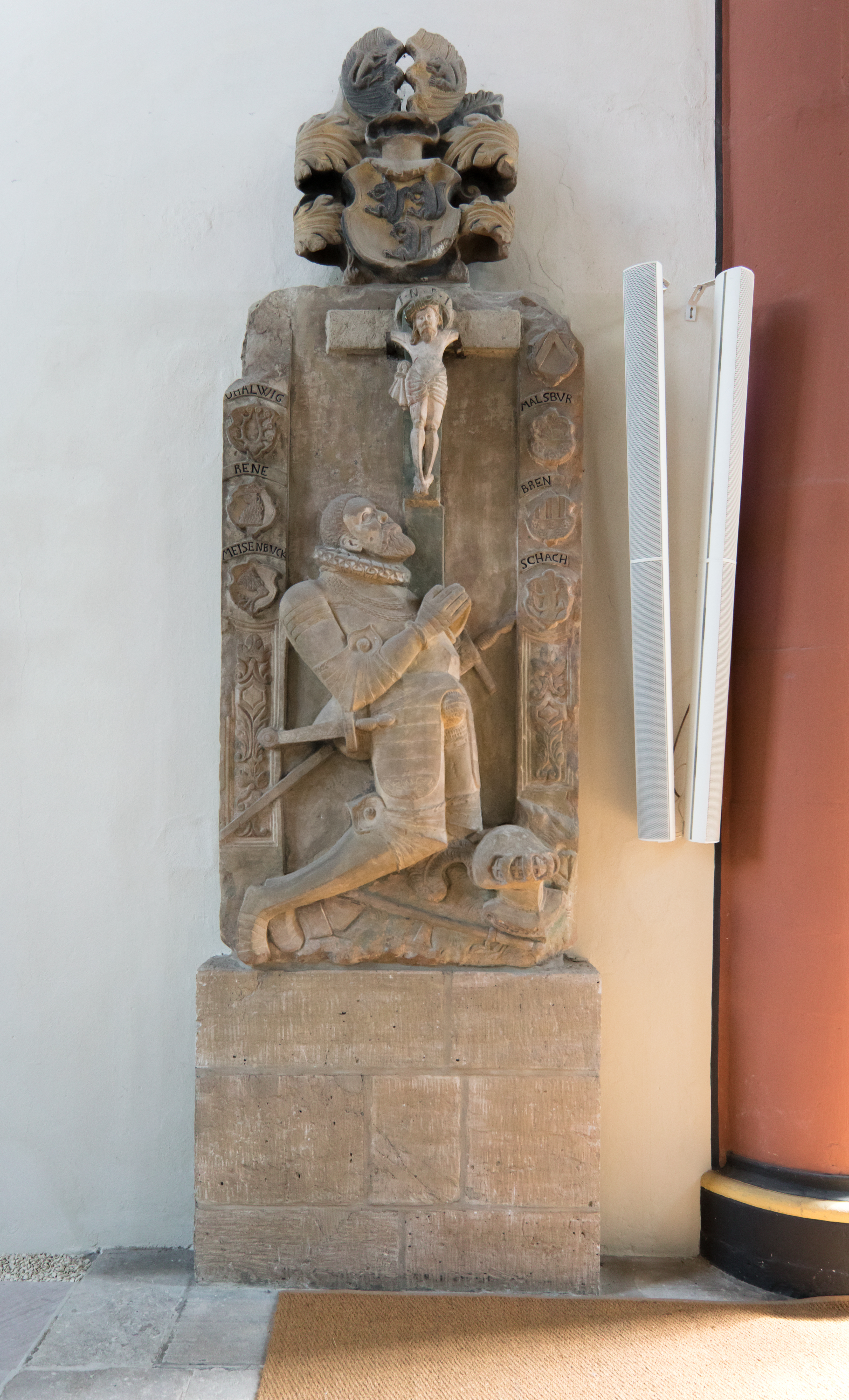 Korbach St.Killian, Epitaph des Otto von Wolmeringhausen